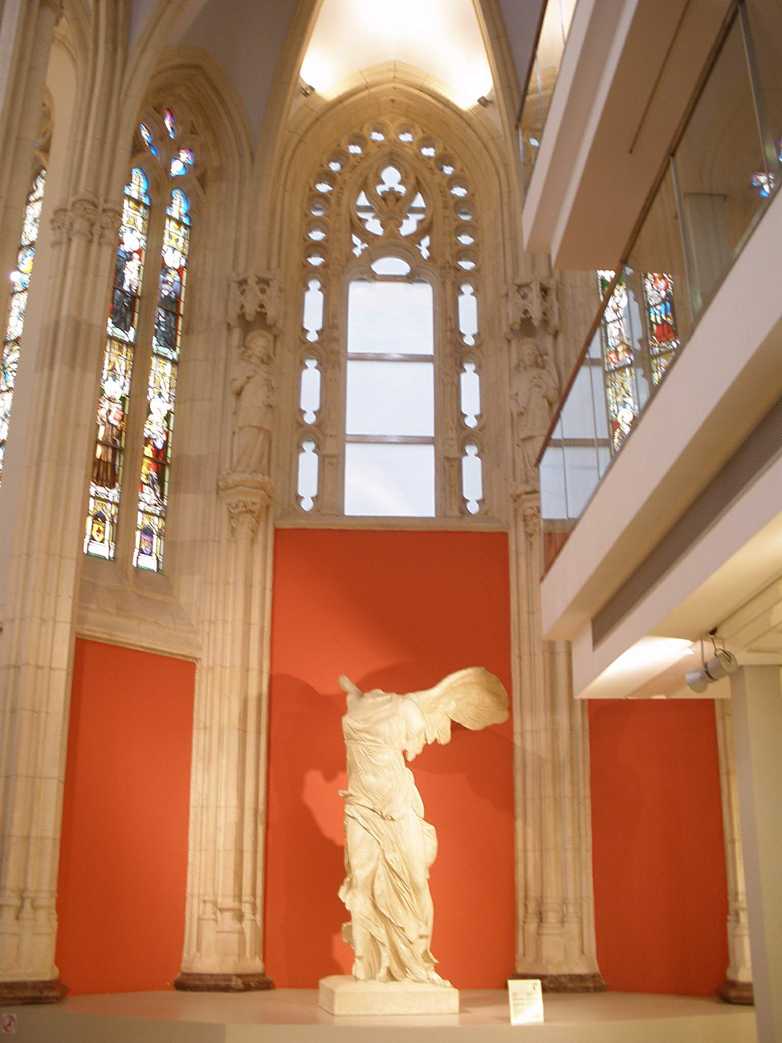 Museo de Reproducciones Artísticas (antigua iglesia del Corazón de María), en Bilbao.